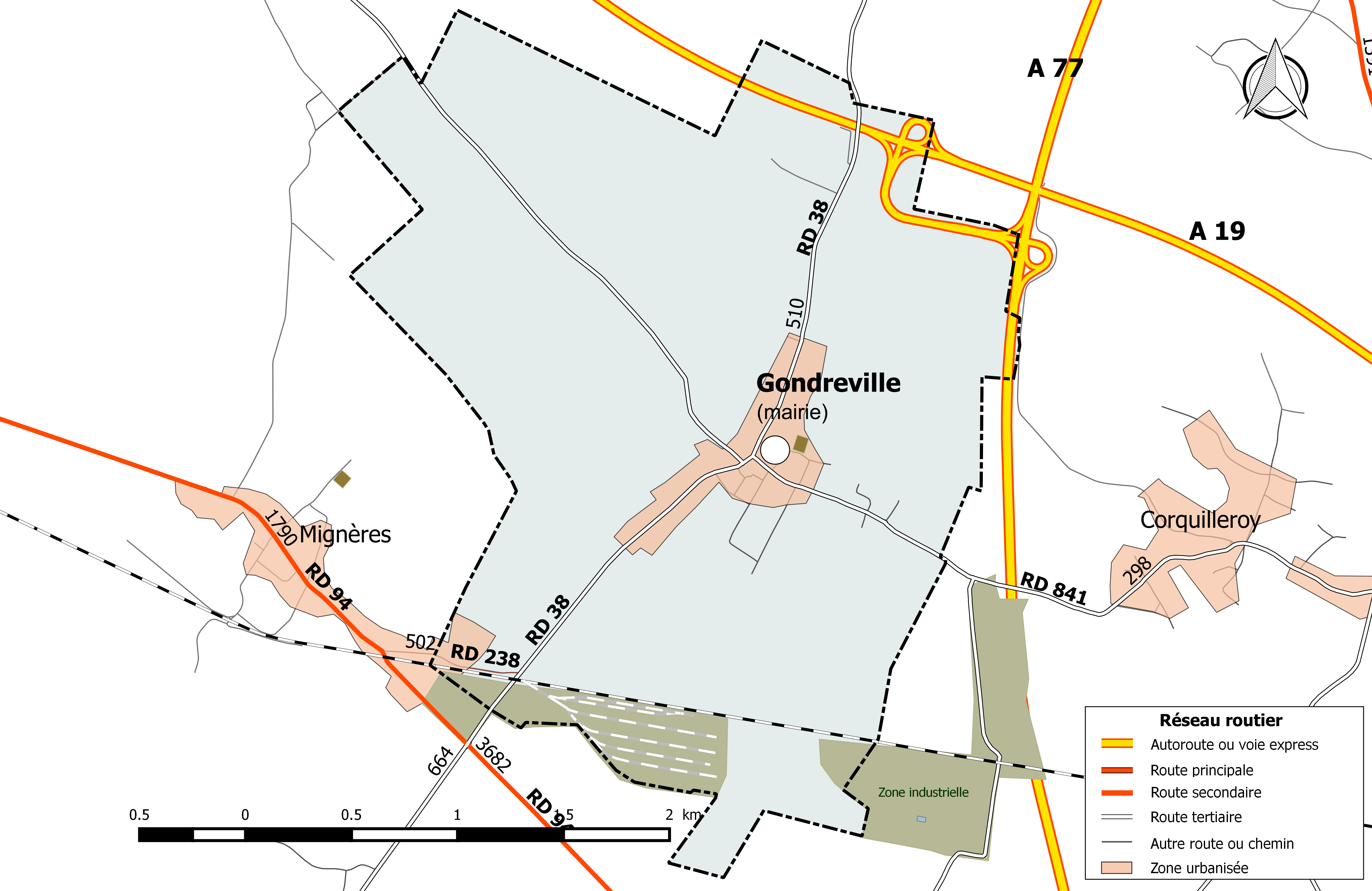 Carte du réseau routier de la commune de Gondreville (Loiret).